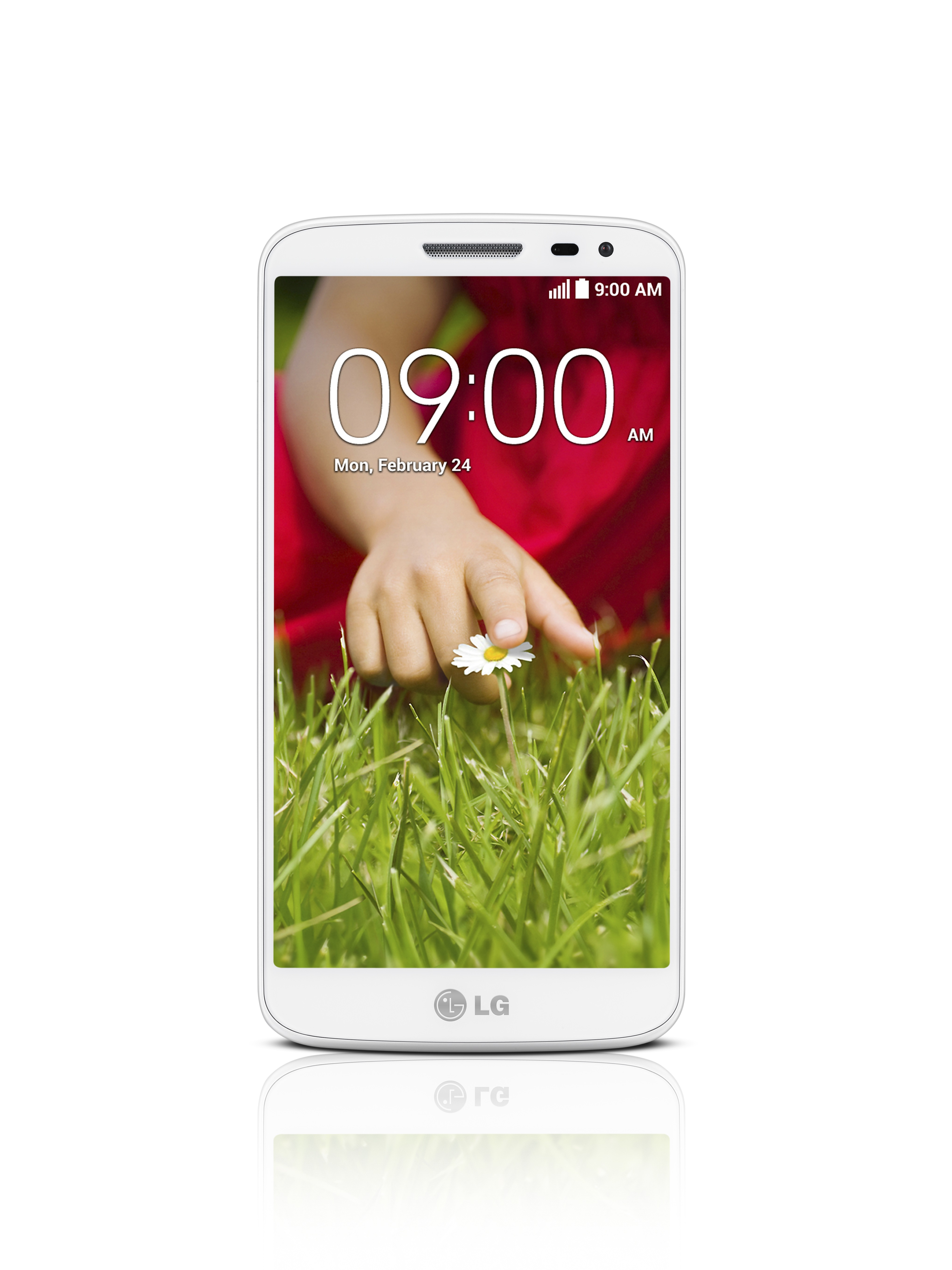 LG전자가 오는 24일(현지시간) 스페인 바르셀로나에서 개막하는 ‘MWC 2014’에서 ‘LG G2’의 혁신적 디자인과 핵심UX 계승한 ‘LG G2 미니’를 공개한다. 이번에 선보일 ‘G2 미니’는 프리미엄 스마트폰 라인업 ‘G시리즈’의 확장 라인업이다. ※ Social LG전자 에서 관련 보도자료를 확인하실 수 있습니다.